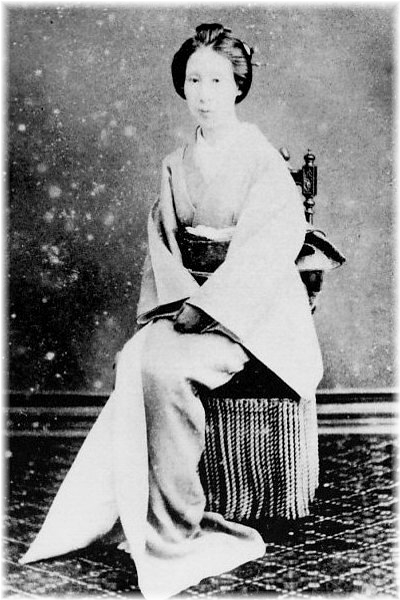 新村信(徳川慶喜側室)の肖像写真